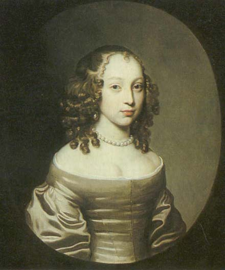 Lady Arabella Churchill (1648-1730), Mätresse des englischen Königs Jakob II.